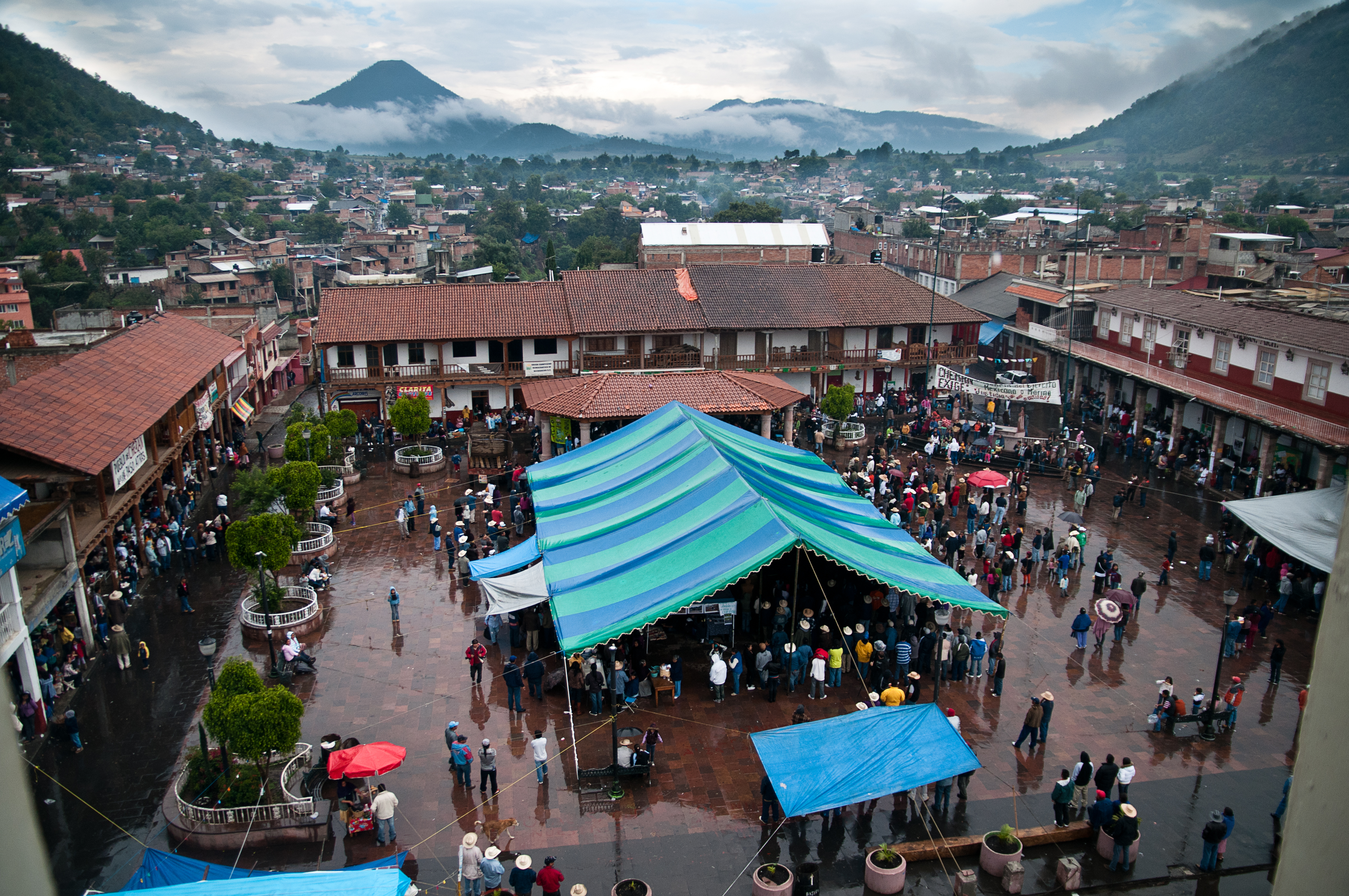 Más fotos en esta presentación en Youtube: Ayuda a Cherán